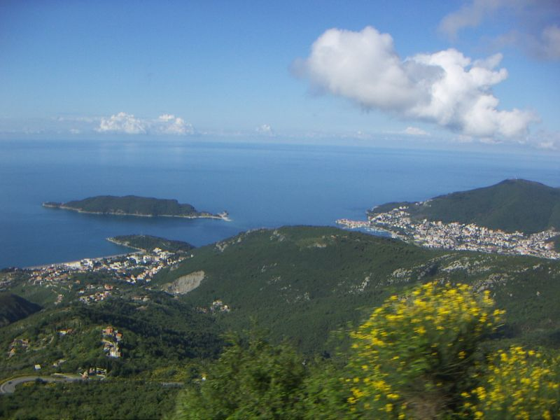 Budva mountain view